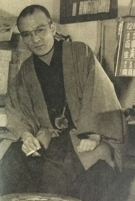 七代目一龍斎貞山